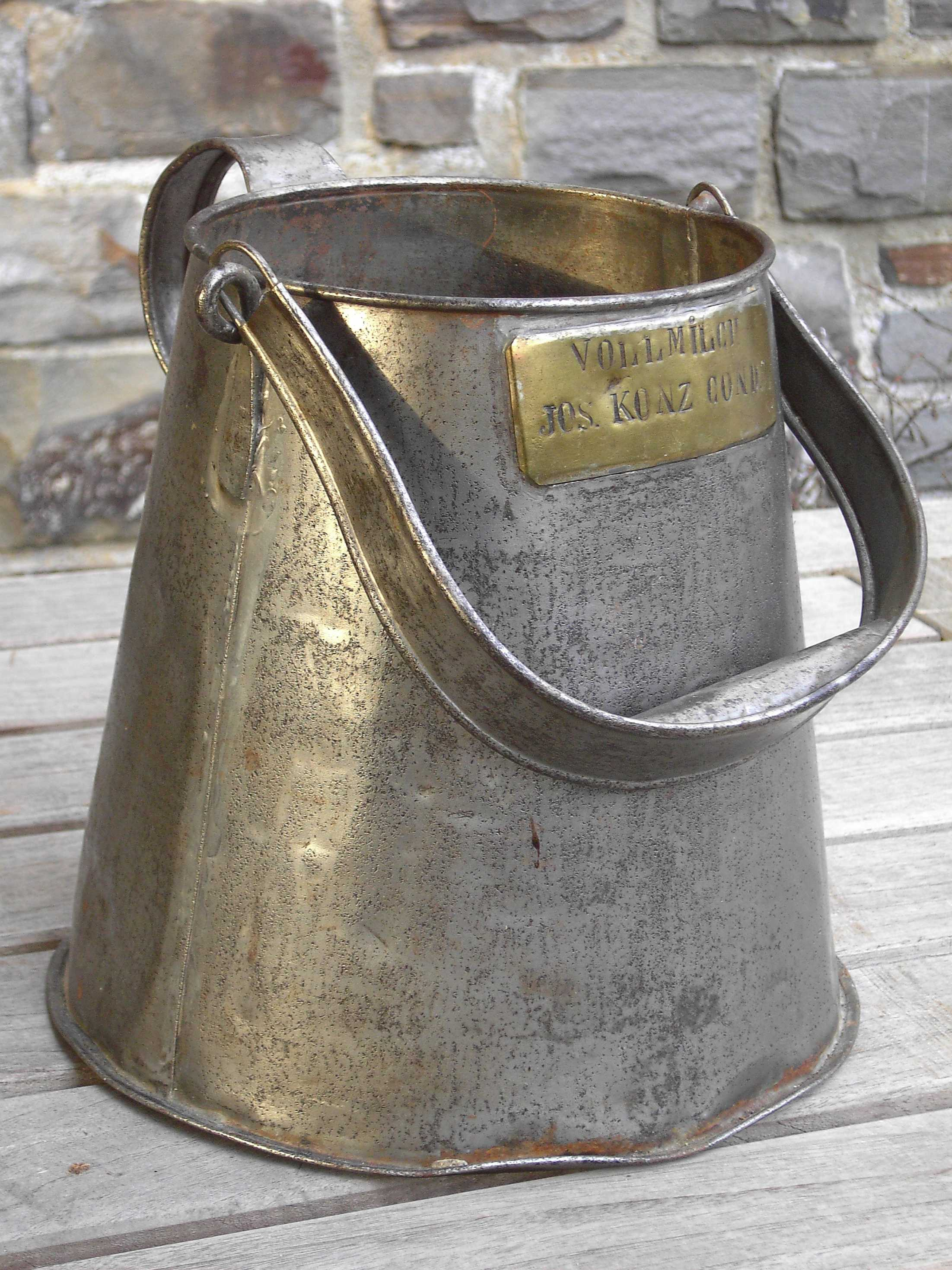 Um 1900 in Cond verbreiteter Milchkannentyp zum Transport im Fährnachen